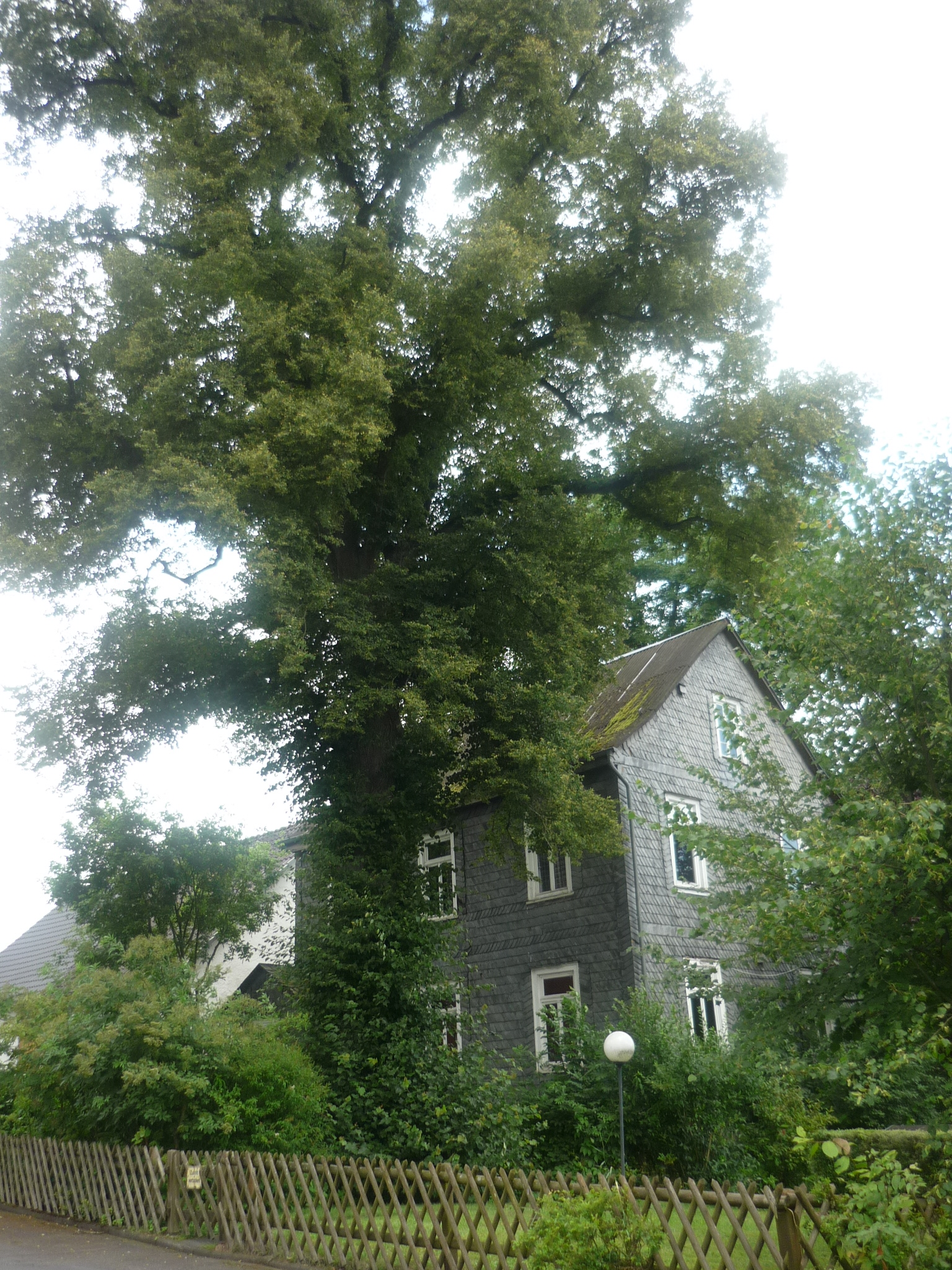 Morgenstimmung in Michelbach Westerwald 2009